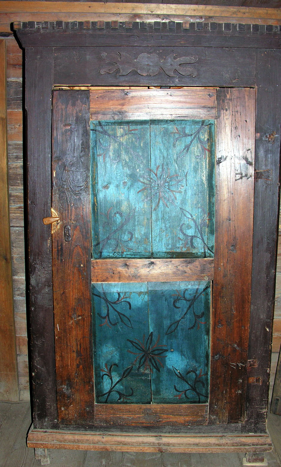 Spinta 2007-04-21, Lietuva